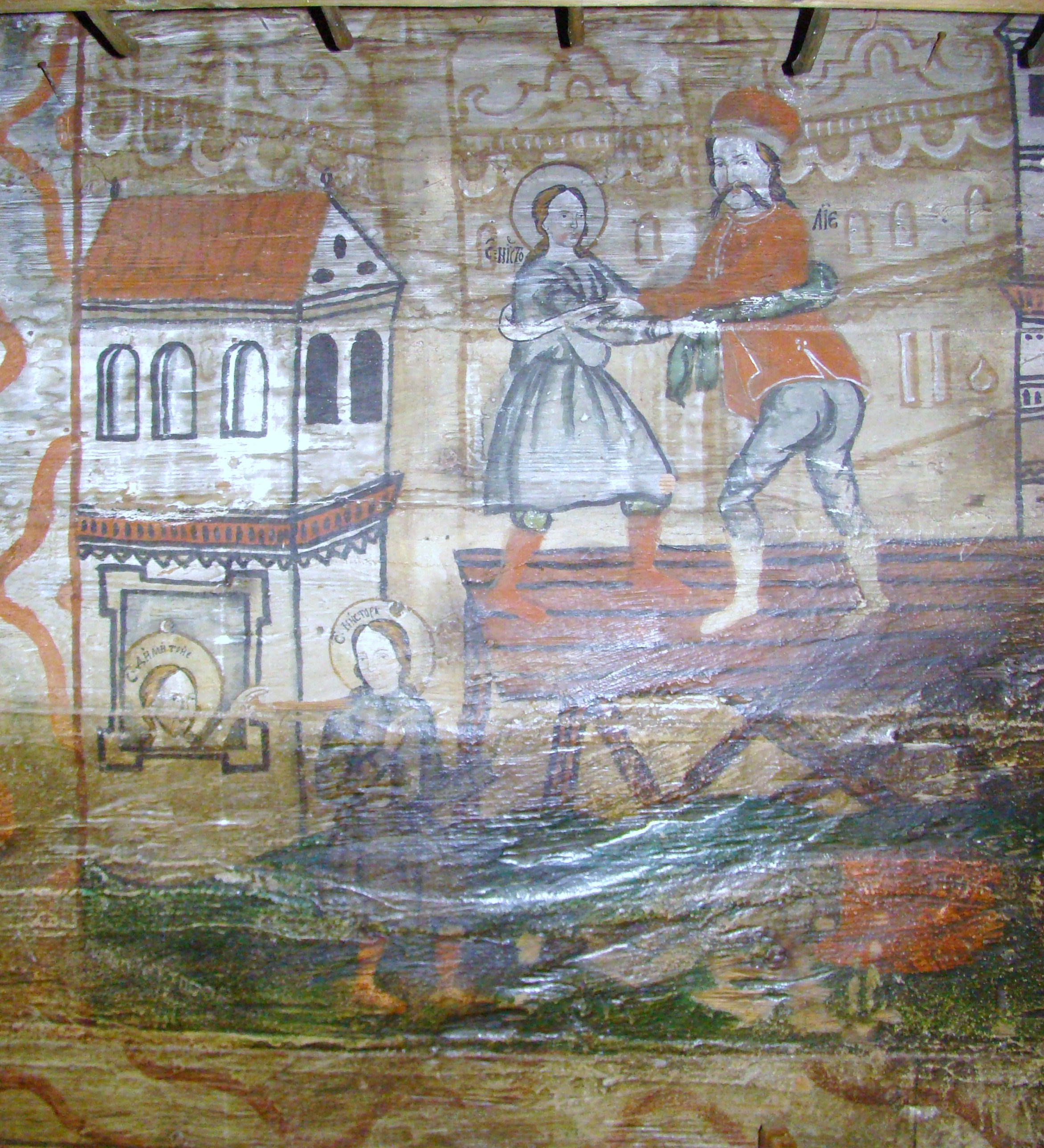 Biserica de lemn "Cuvioasa Paraschiva" , sat POIENILE IZEI